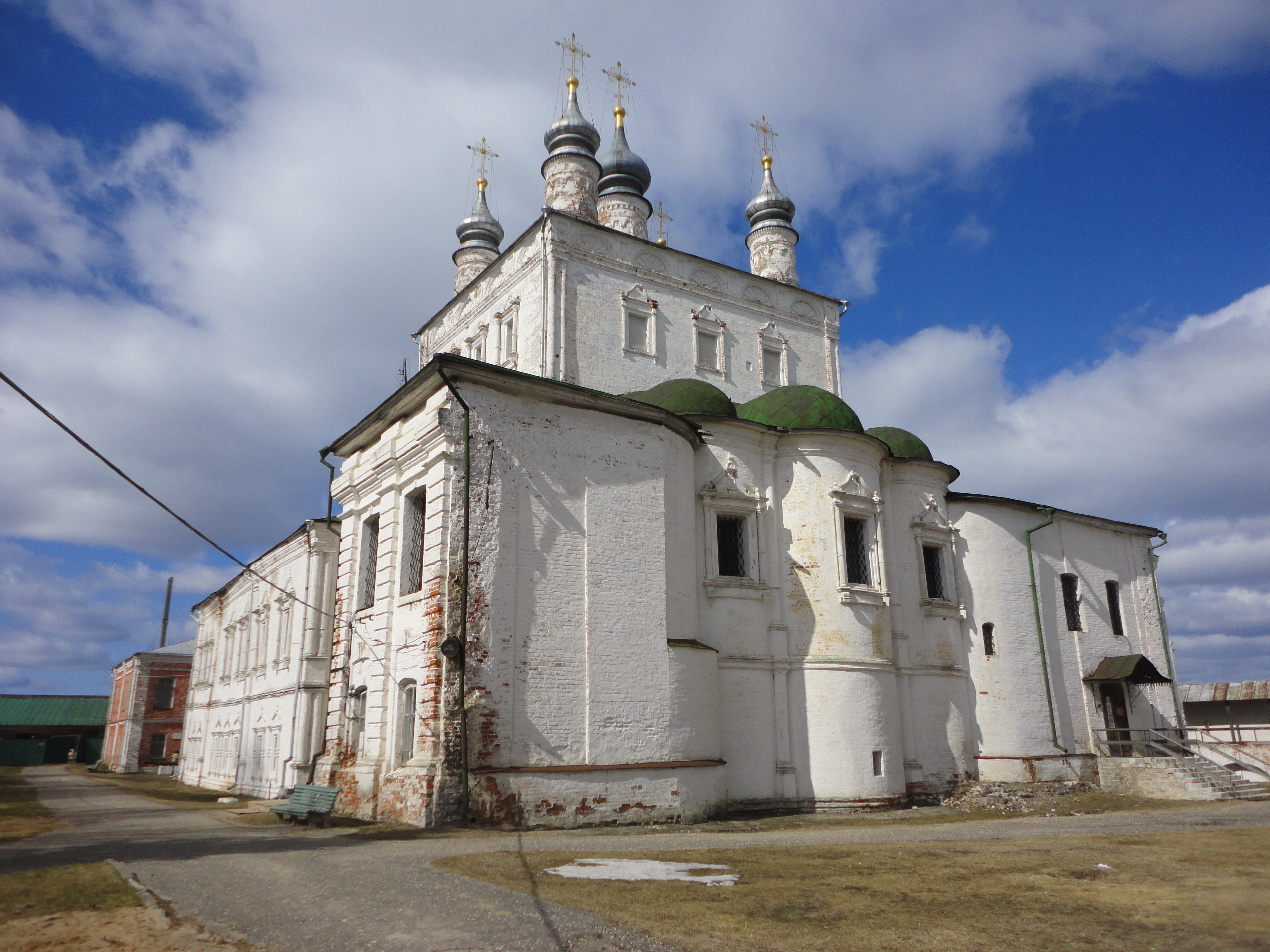 Переславль-Залесский историко-архитектурный и художественный музей (музейный комплекс): Переславль-Залесский, Ярославская область